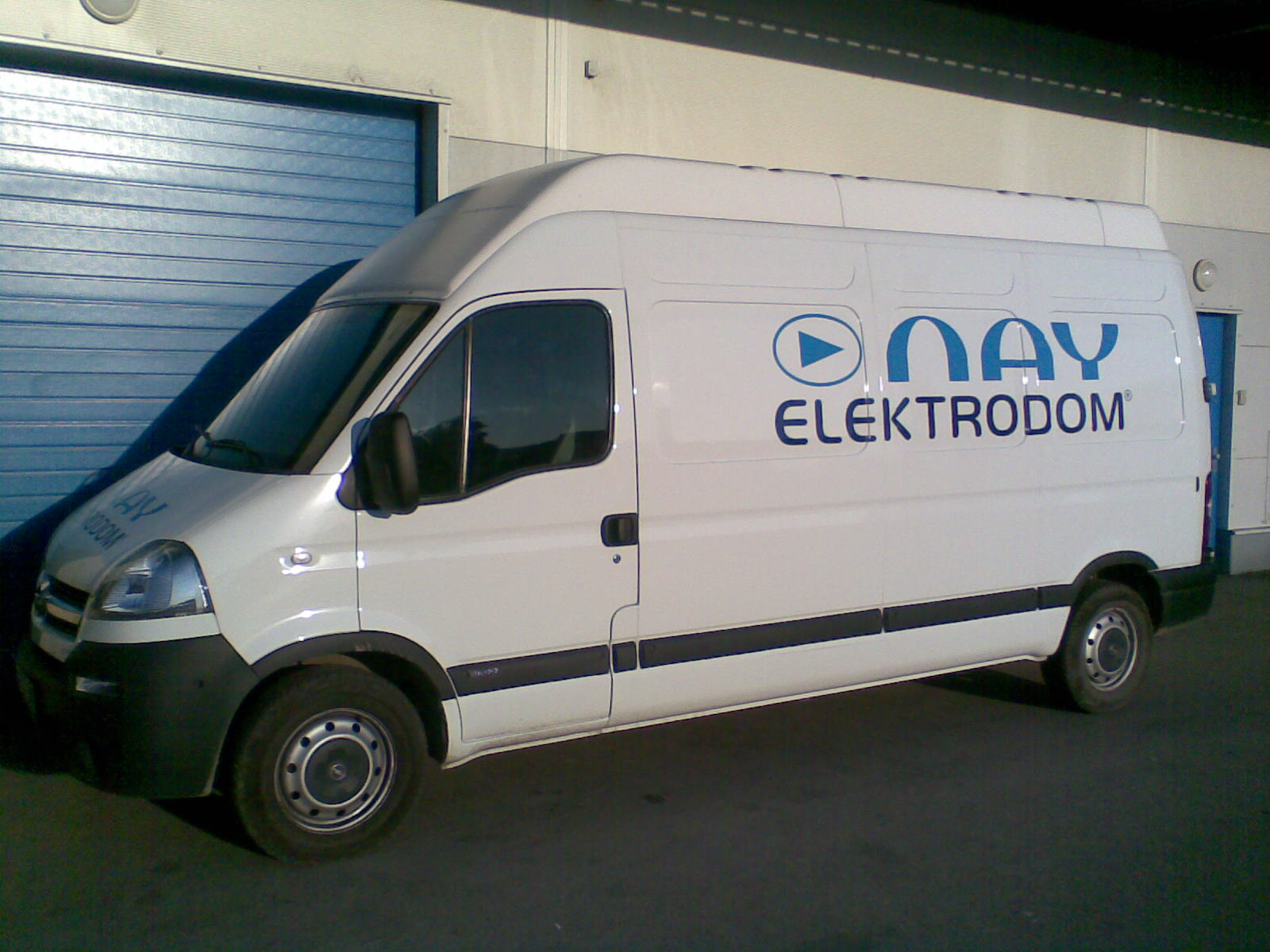 Auto spoločnosti Nay elektrodom